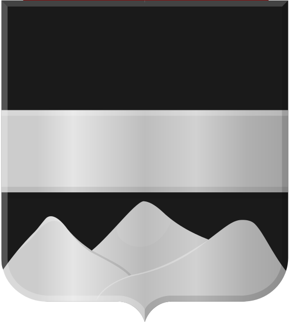 De blazoenering van het wapen van Blankenberge uit 1841: Een zwart veld, met een zilveren bende vergezeld van eenen berg met twee leegere bergtoppen, ook van zilver.NGW